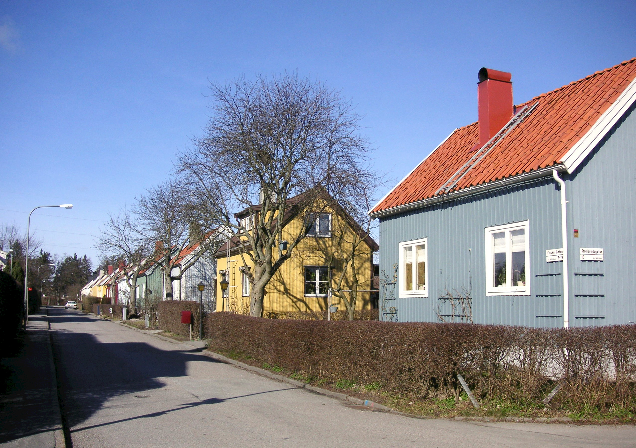 Enskedefältets trädgårdsstad, Finska Gatan, Stockholm